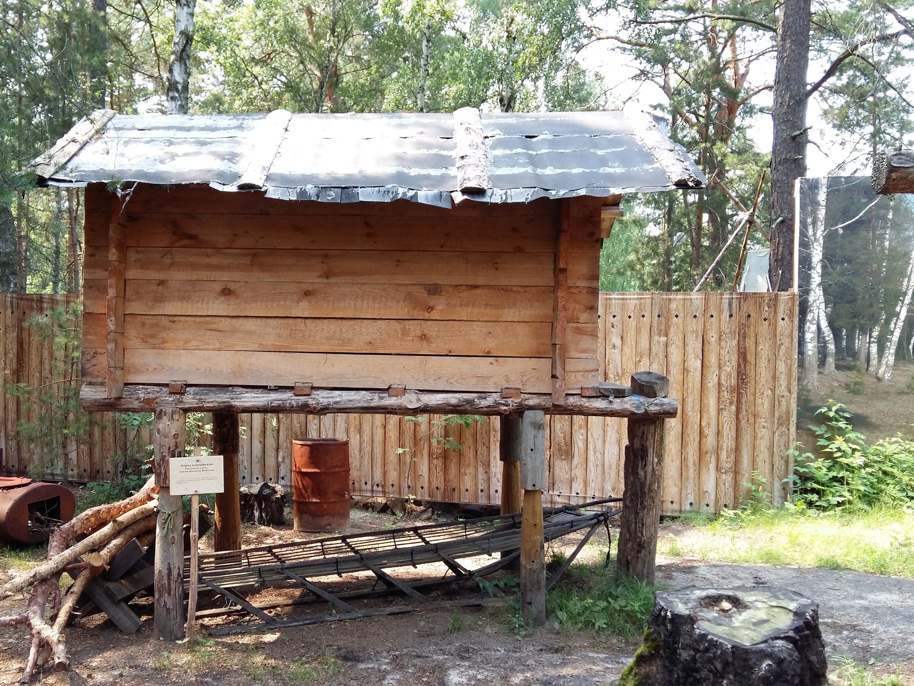 Мансийский лабаз в интерактивной зоне Археологического музея-заповедника на озере Андреевское (Тюменский район, Тюменская область).